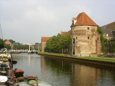 Stadsgracht